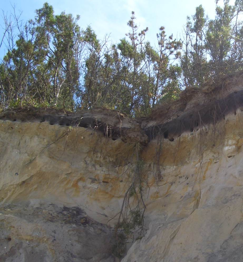 Naturschutzgebiet Nordwestufer Wittow und Kreptitzer Heide. Nisthöhlen der Uferschwalben. Bodentyp: Podsol